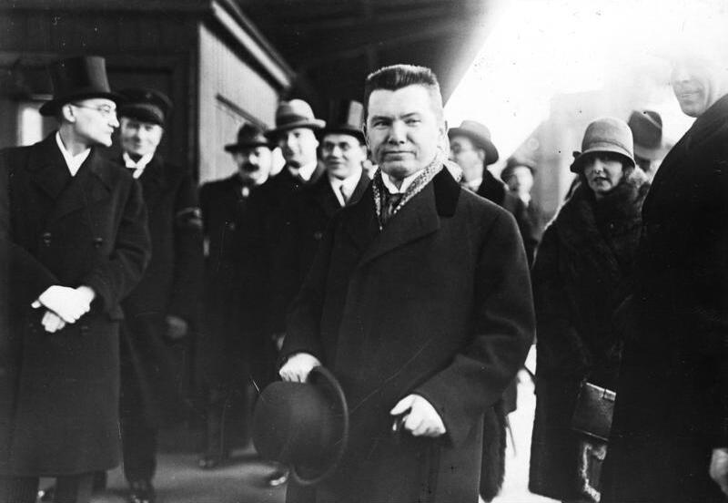 Der litauische Ministerpräsident und Aussenminister Prof. Woldemaras ist in Berlin eingetroffen, um mit dem Reichsaussenminister Dr. Streesemann einen neuen Handelsvertrag zwischen Deutschland und Litauen abzuschliessen.